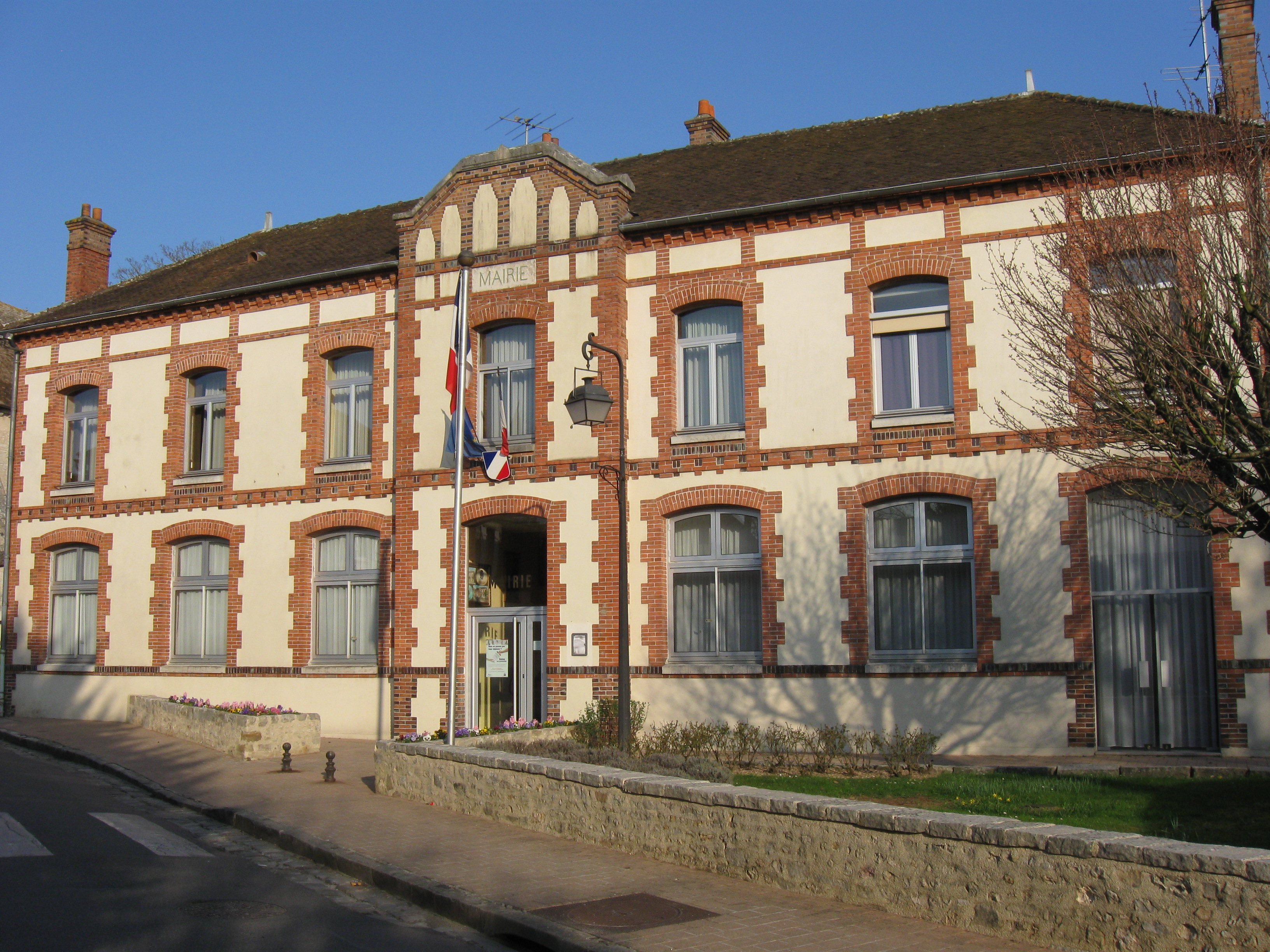 Mairie de Grez-sur-Loing (Seine-et-Marne, région Île-de-France)